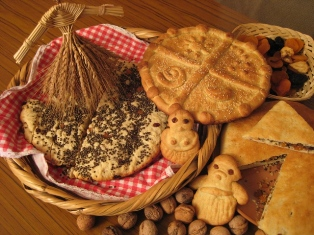 ամանորի ծիսական հացեր և տարեհացի տարբերակներ